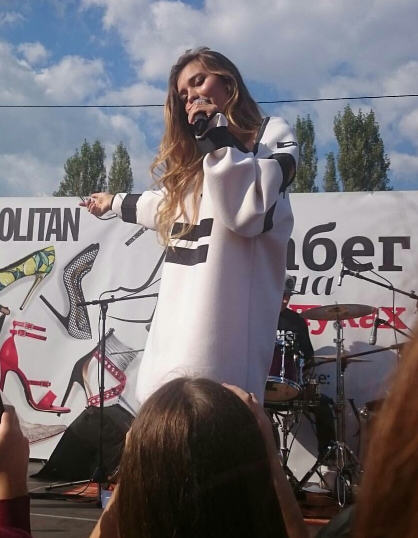 Виступ Регіни Тодоренко біля ТРЦ Караван у Києві, вересень 2016